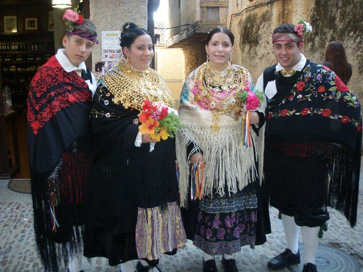 Trajes tradicionales serranos